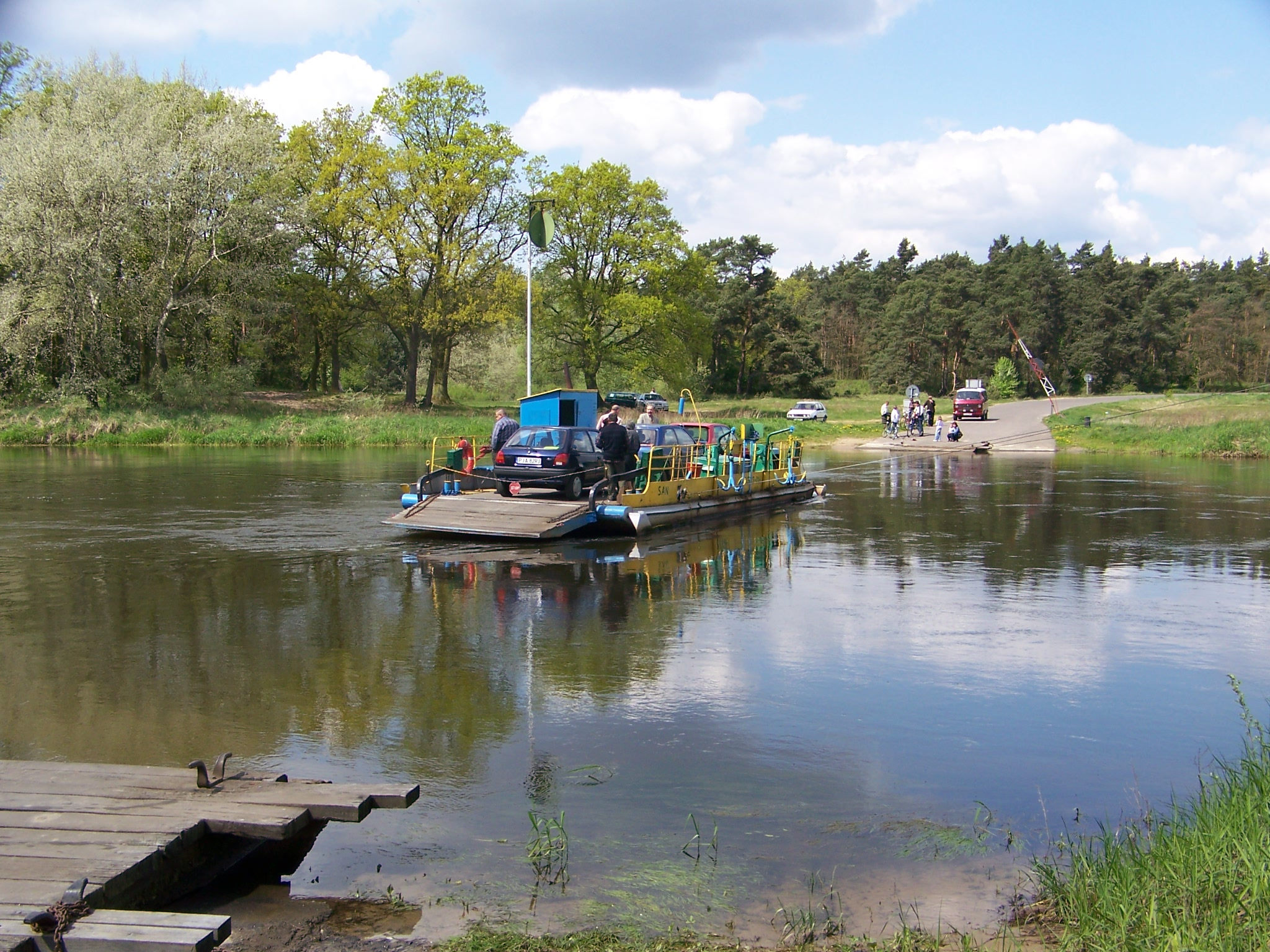 Przeprawa promowa przez Wartę w Dębnie